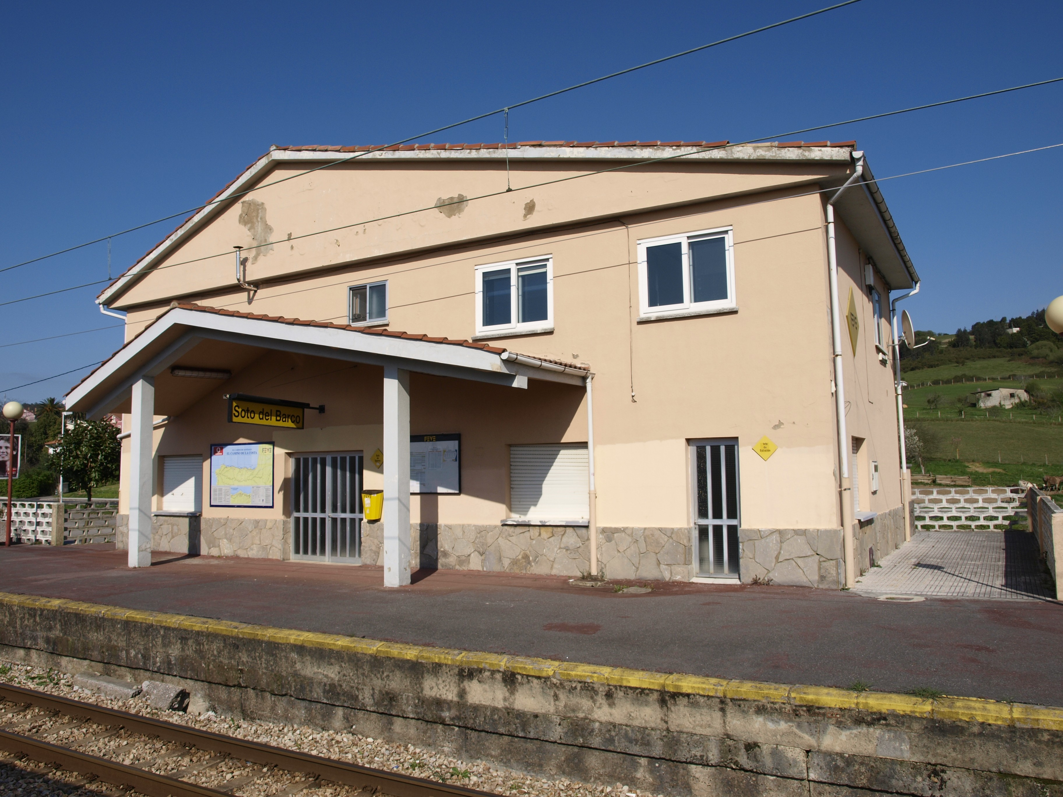 Estación Feve Soto del Barco